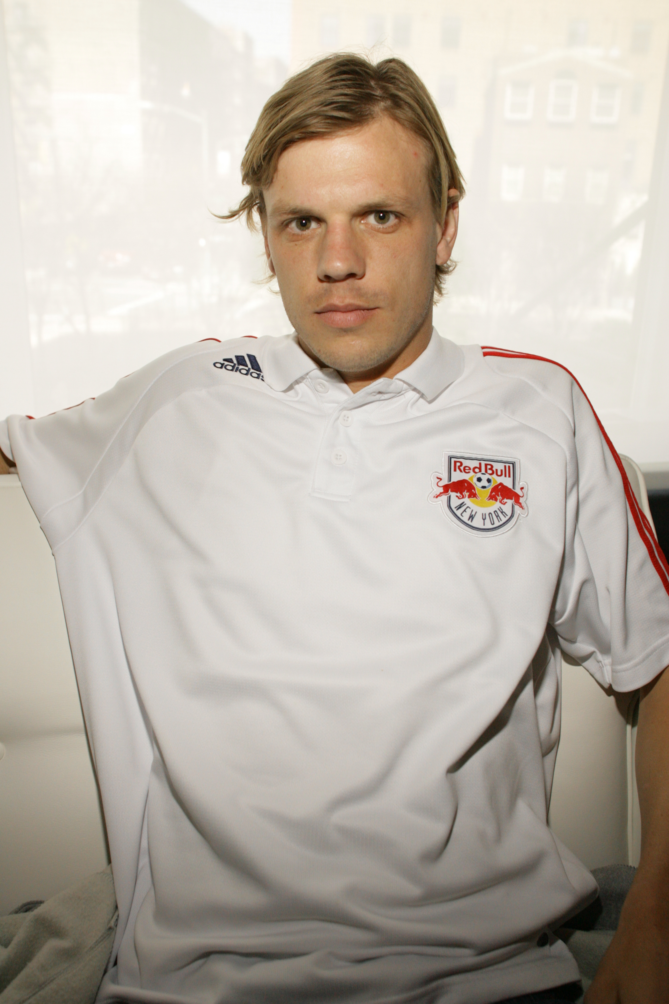 Dave van den Bergh